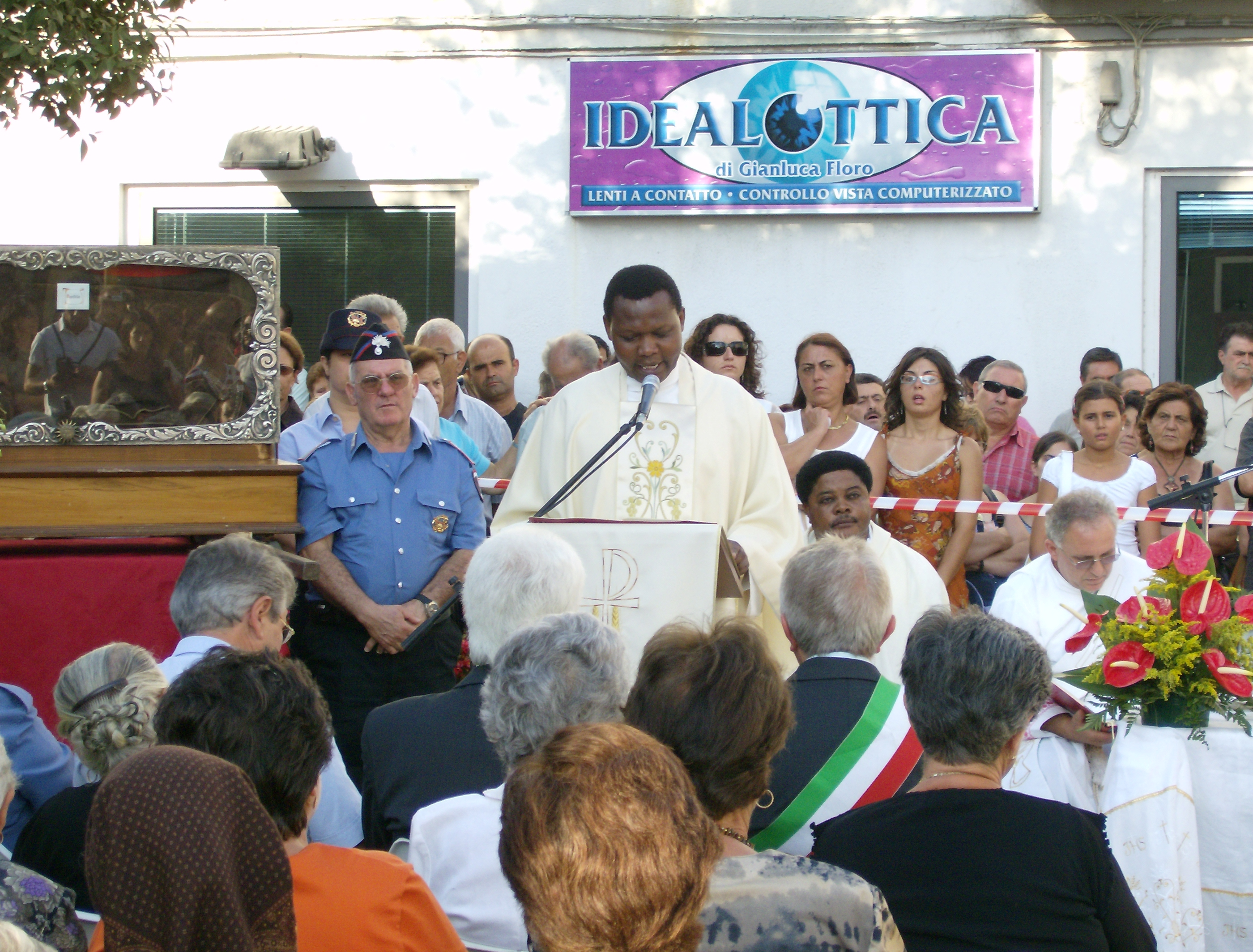 Scattata da me medesimo il 3 settembre 2007, all'inizio della messa di fine Festa padronale. distintissimi.